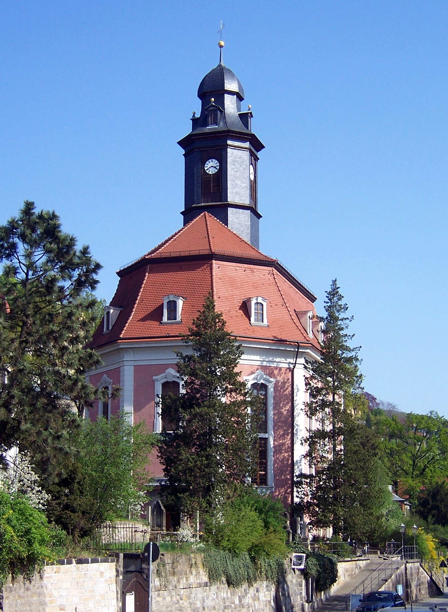 Die Loschwitzer Kirche in Dresden von Südwesten (Körnerplatz) aufgenommen.